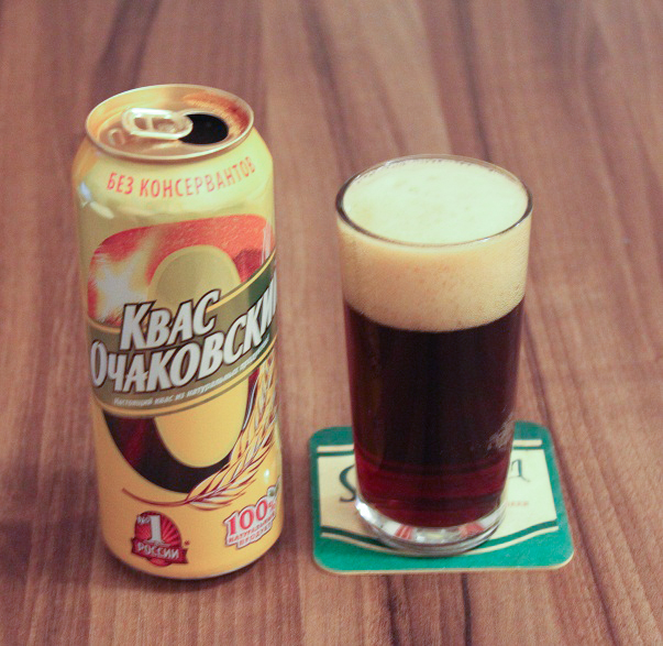 Original russischer Kwas in 0,5L Dose